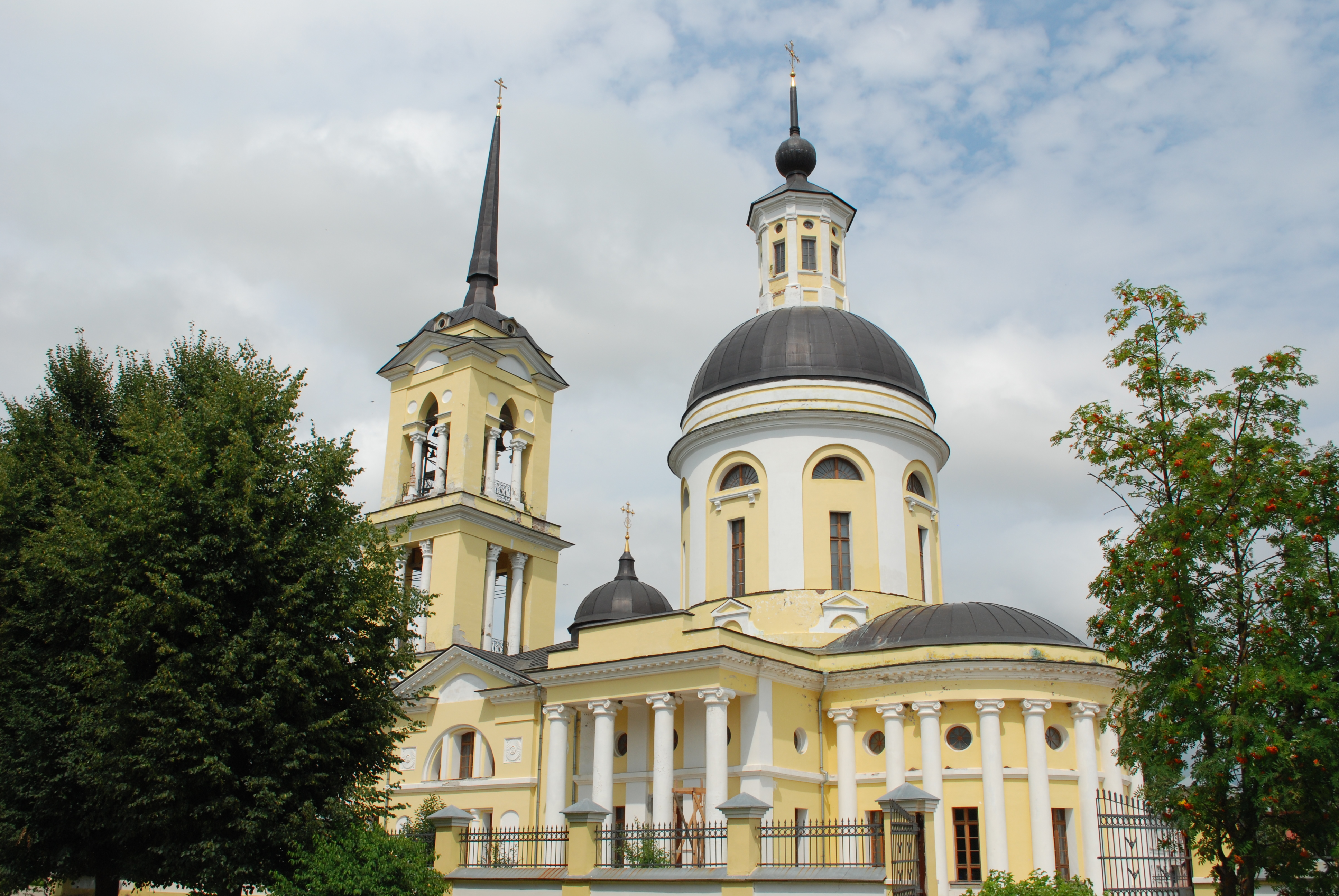 Собор Никольский (Калужская область, Мосальск, Ленина площадь)